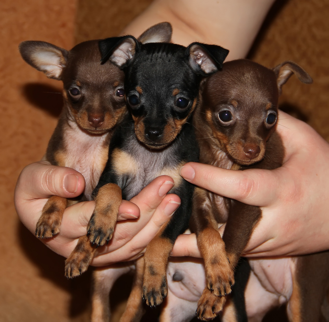 Щенки русского той-терьера